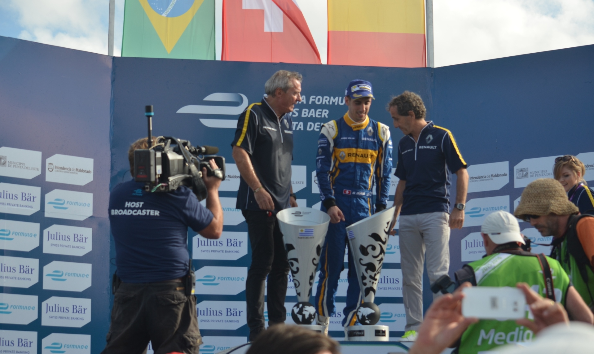 Solo se permite el uso de esta imagen mencionando a Velocidad Total como su autor. Imagen de la ceremonia de premiación del Punta del Este ePrix de 2015, en el podio ubicado en la Playa Brava.